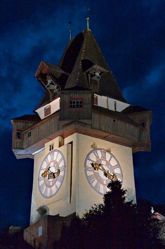 Grazer Uhrturm